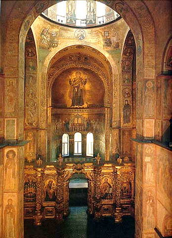 Расположение Оранты в конхе апсиды Мозаика